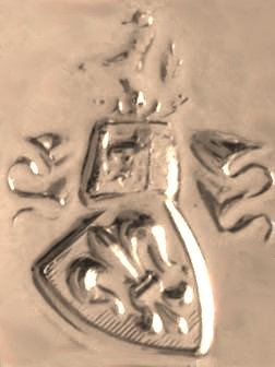 Abdruck des Siegelrings der C. von Reinken, um 1900